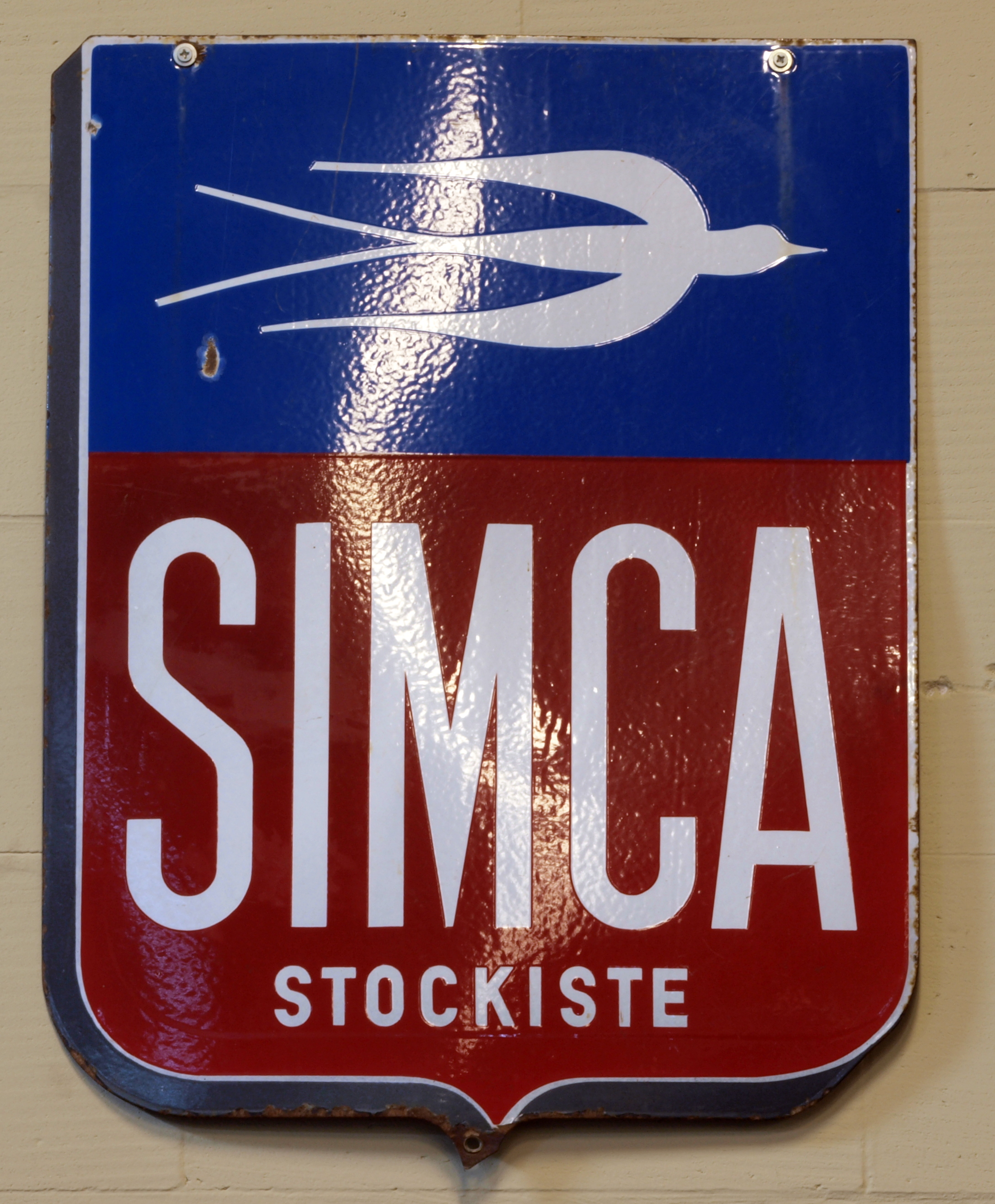 Den Hartogh Ford Museum.